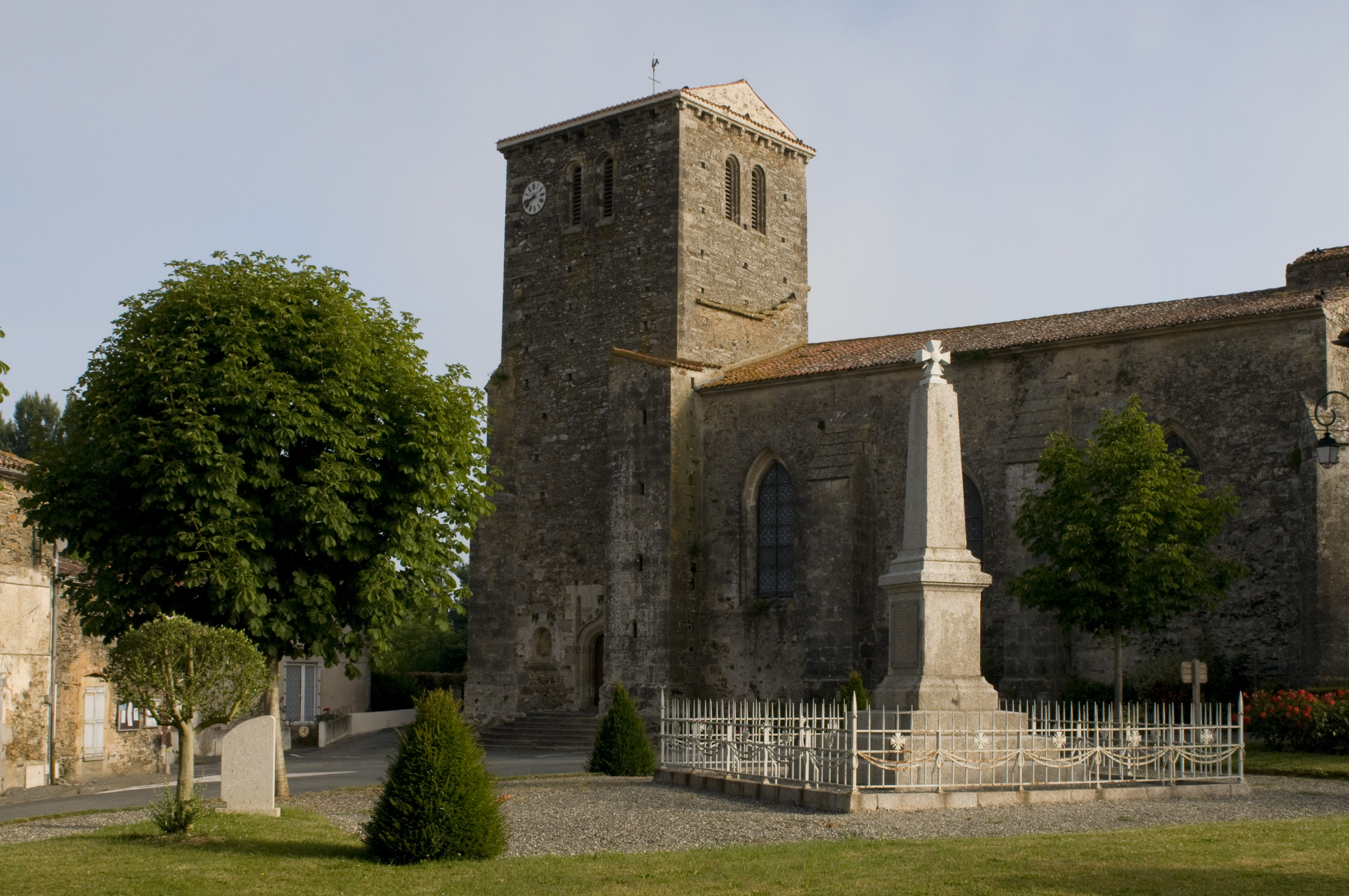 L'église St Hilaire.